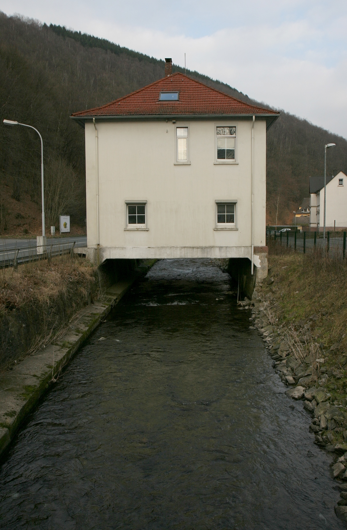 Der Fluss Verse in Werdohl-Eveking.